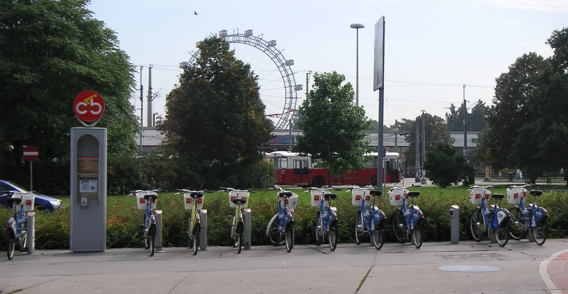 Citybike-Verleihstation beim Praterstern, Wien